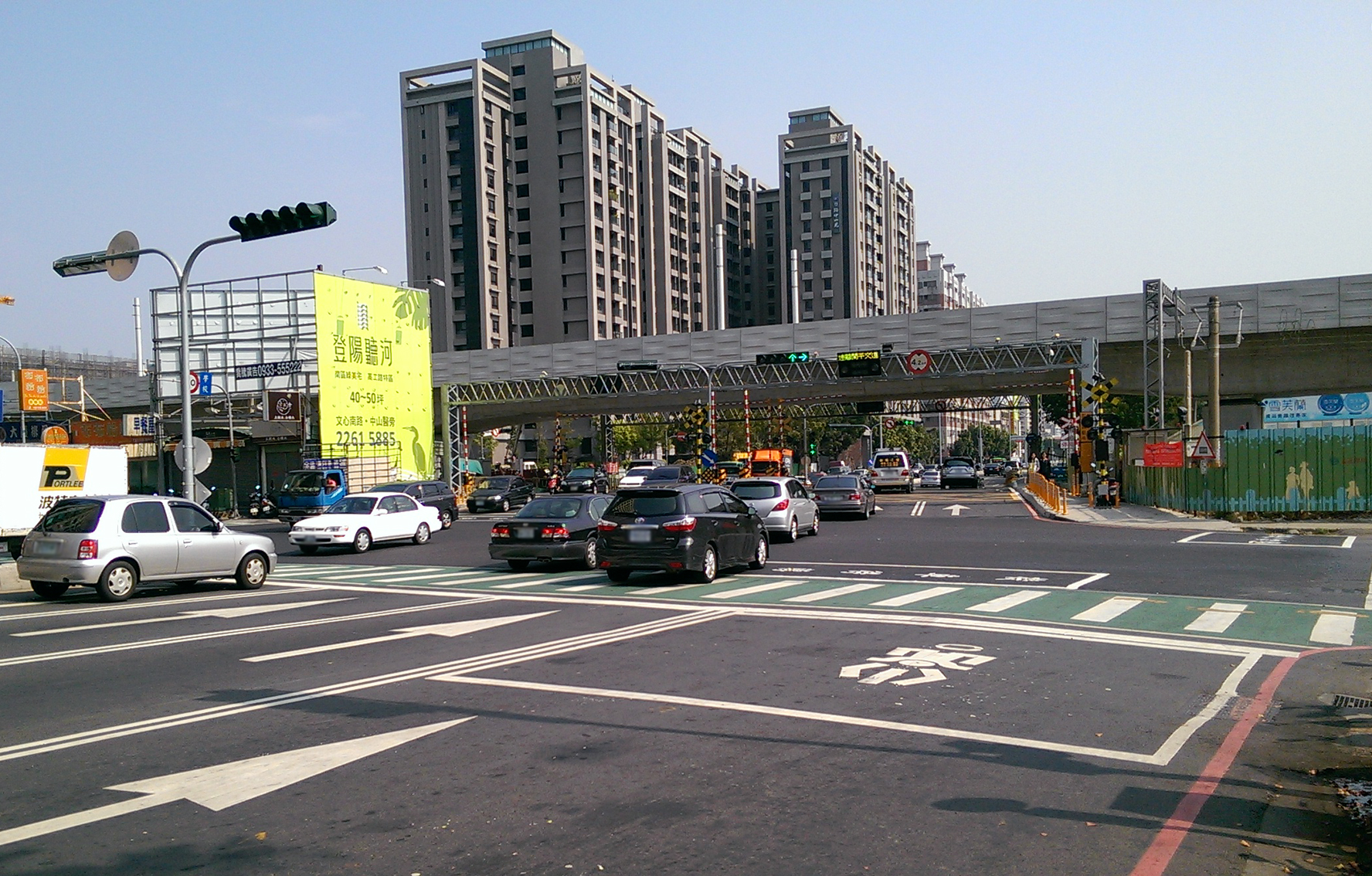 中文（台灣）: 臺中市文心建國路口平交道。